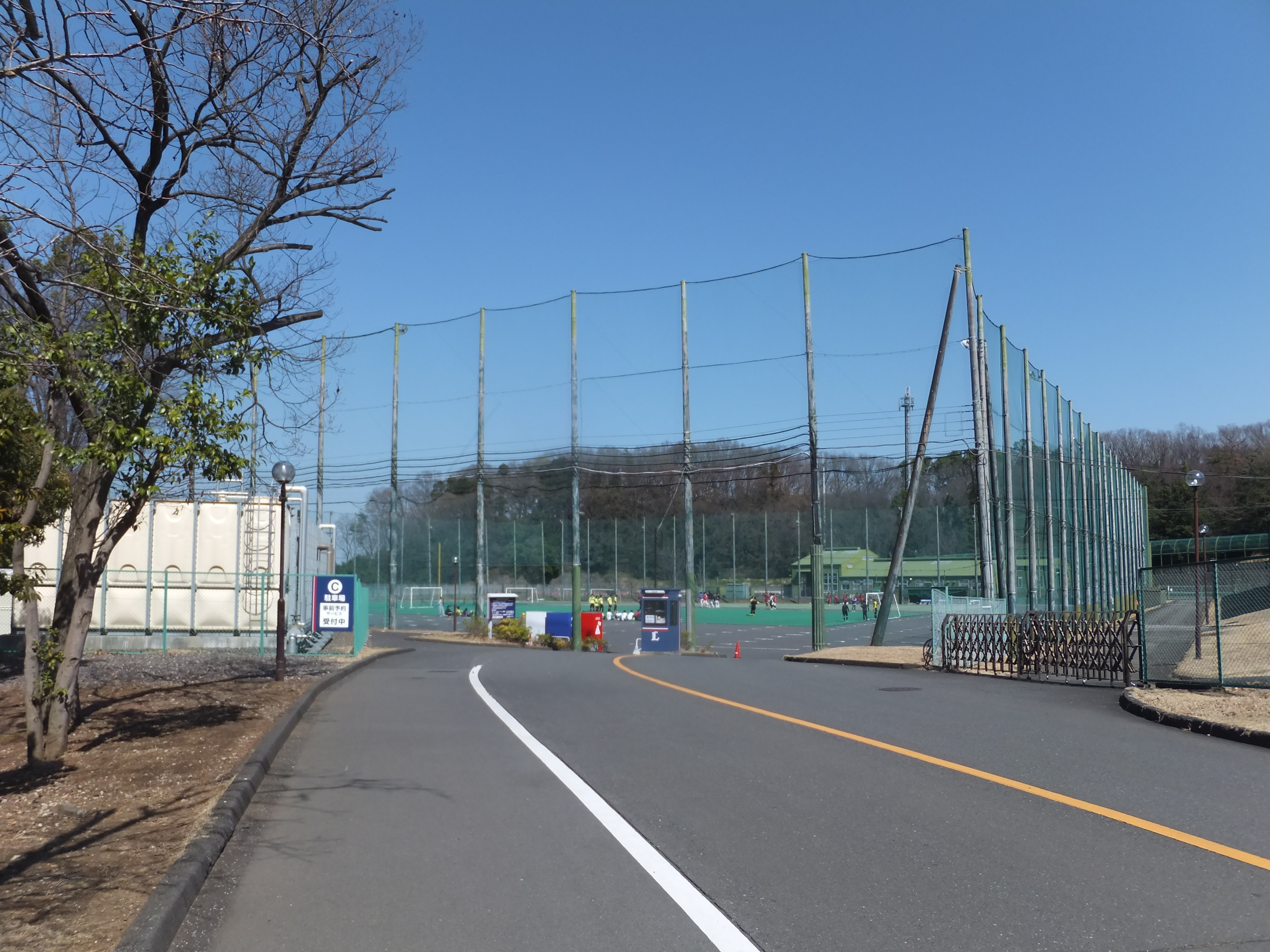 西武ドームサッカーパーク。西武第三球場の跡地に整備された。